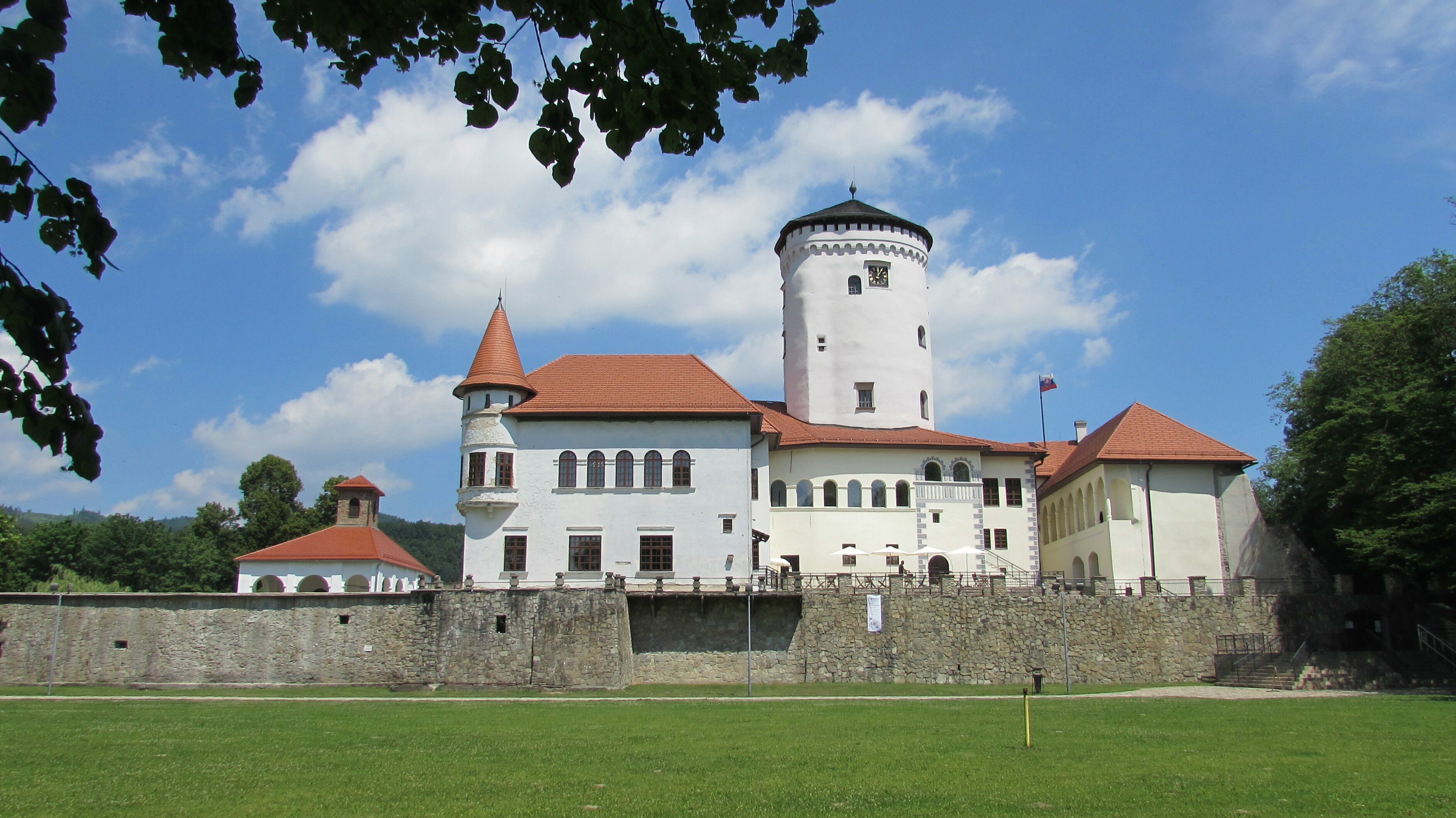 Zilina Schloss Budatín-2